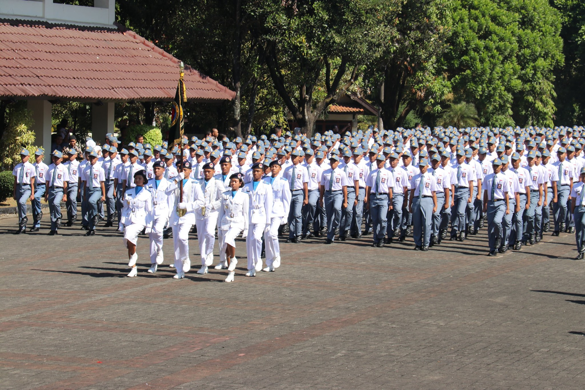 Pataka SMA TN dalam Defile Siswa Baru